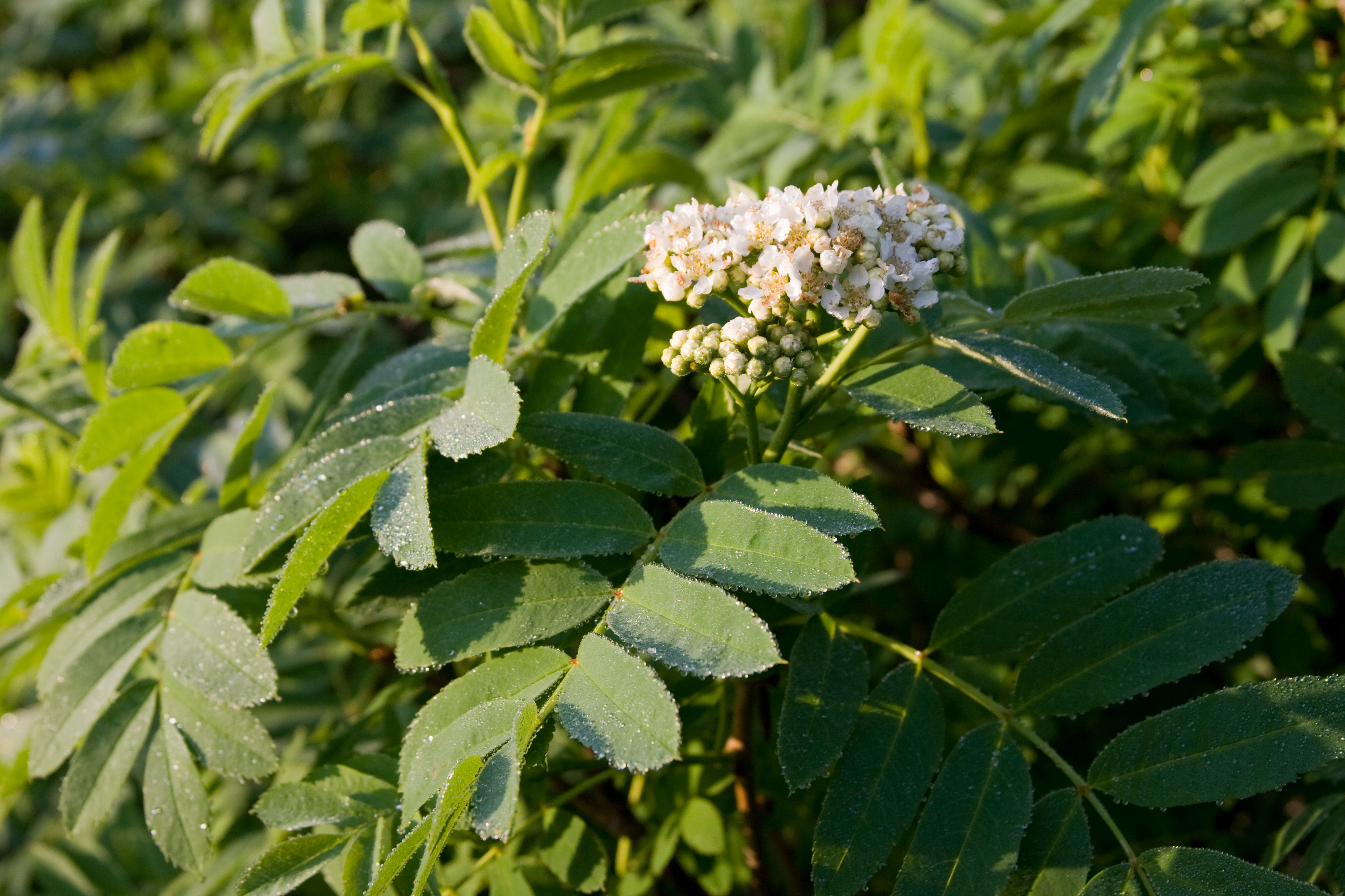 ウラジロナナカマド (学名:Sorbus matsumurana)